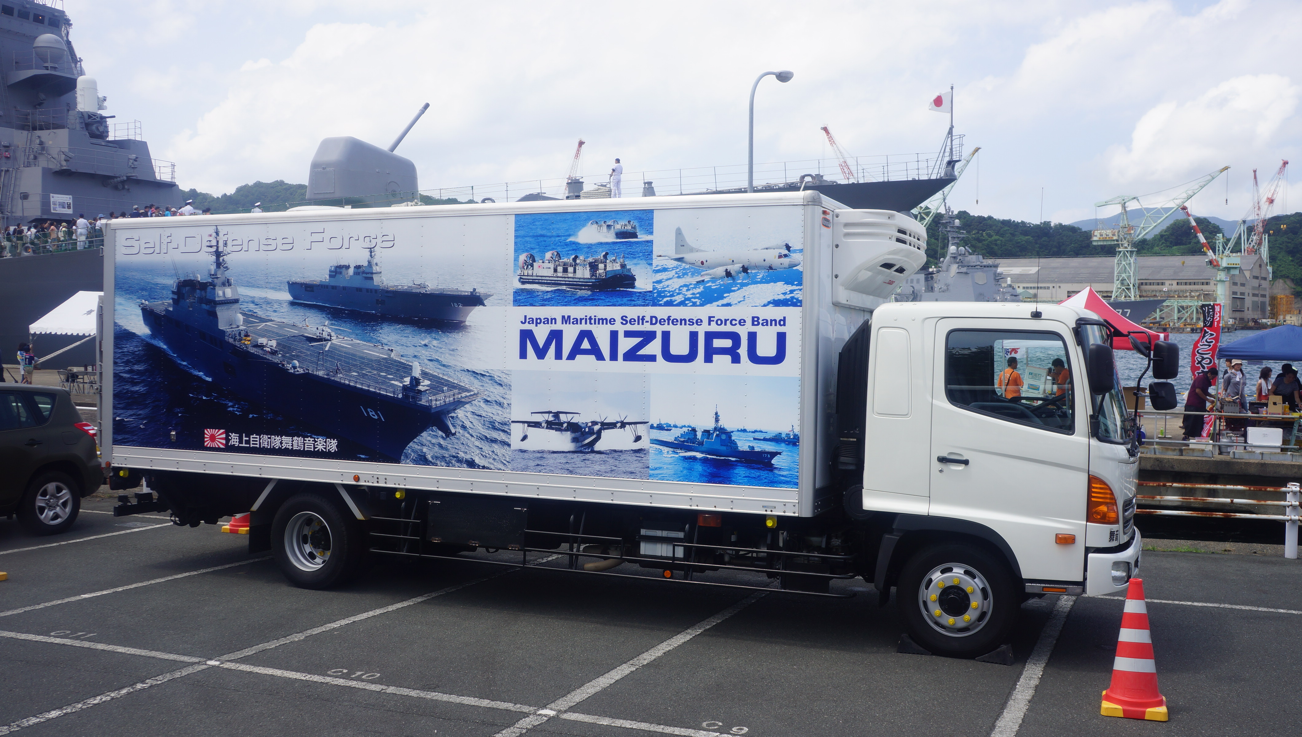 海上自衛隊 舞鶴音楽隊 楽器運搬車（日野・レンジャー）。 14年7月27日 舞鶴航空基地にて。